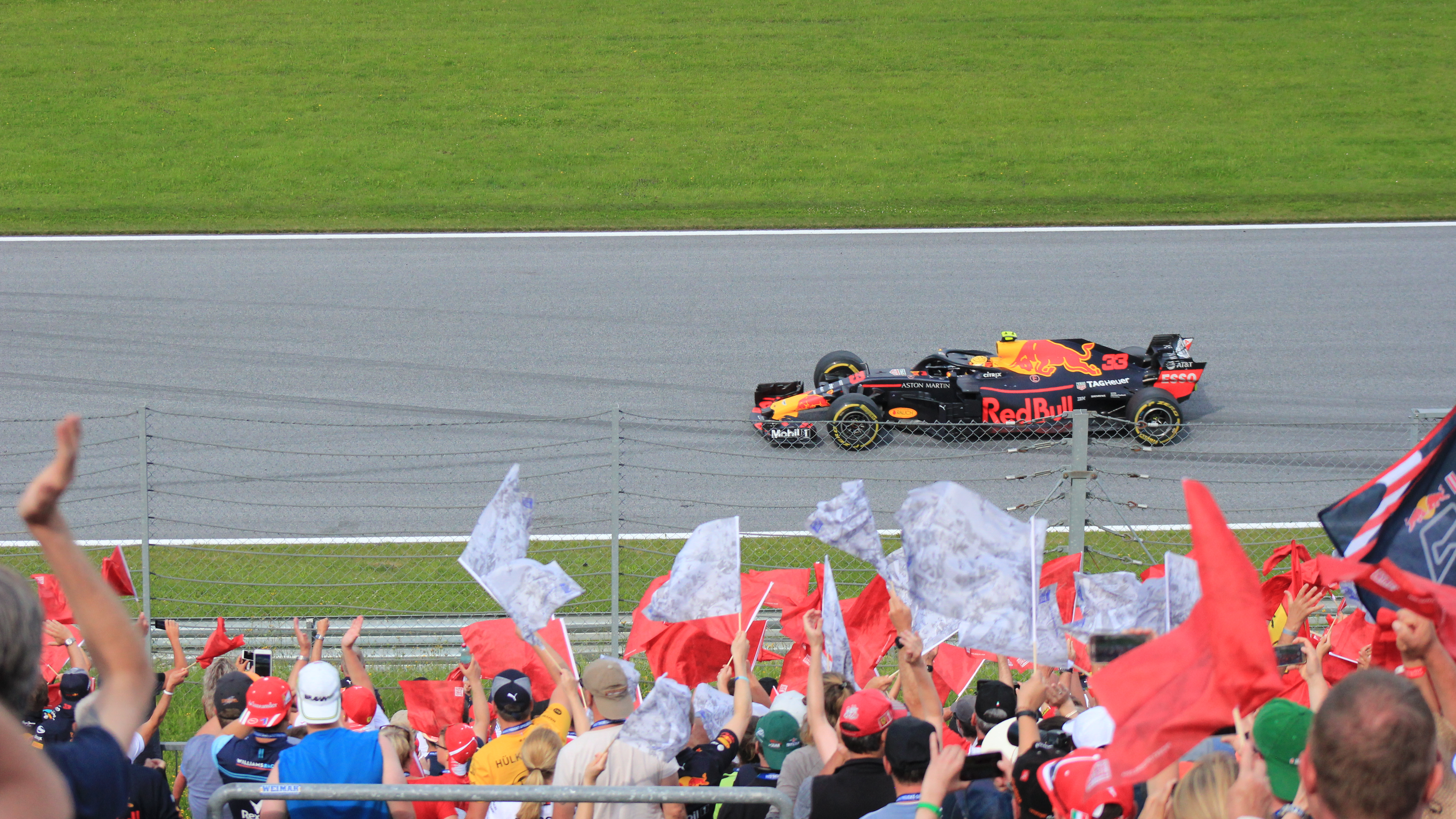 Szenen vom Rennen (Verstappen in der Auslaufrunde vor der Red-Bull-Tribüne)